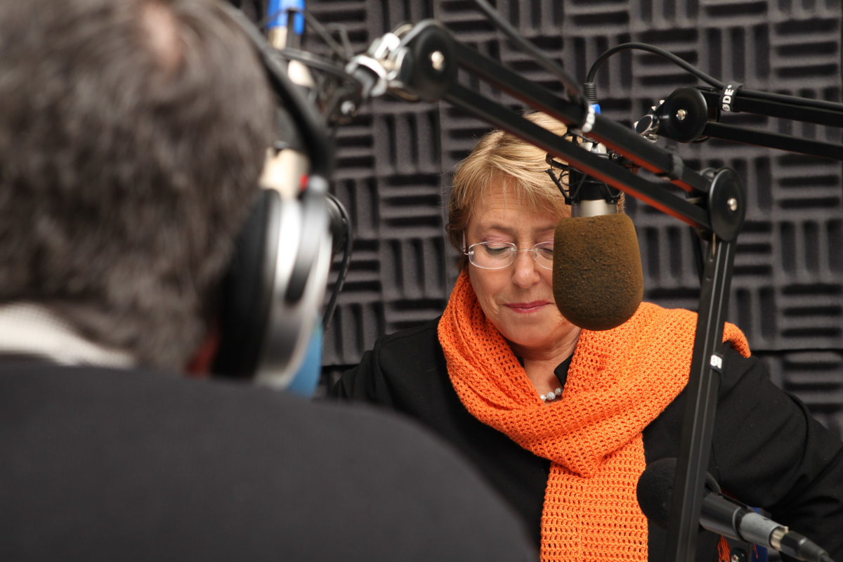 Entrevista Radio Fantástica de Talca 25/09/2013